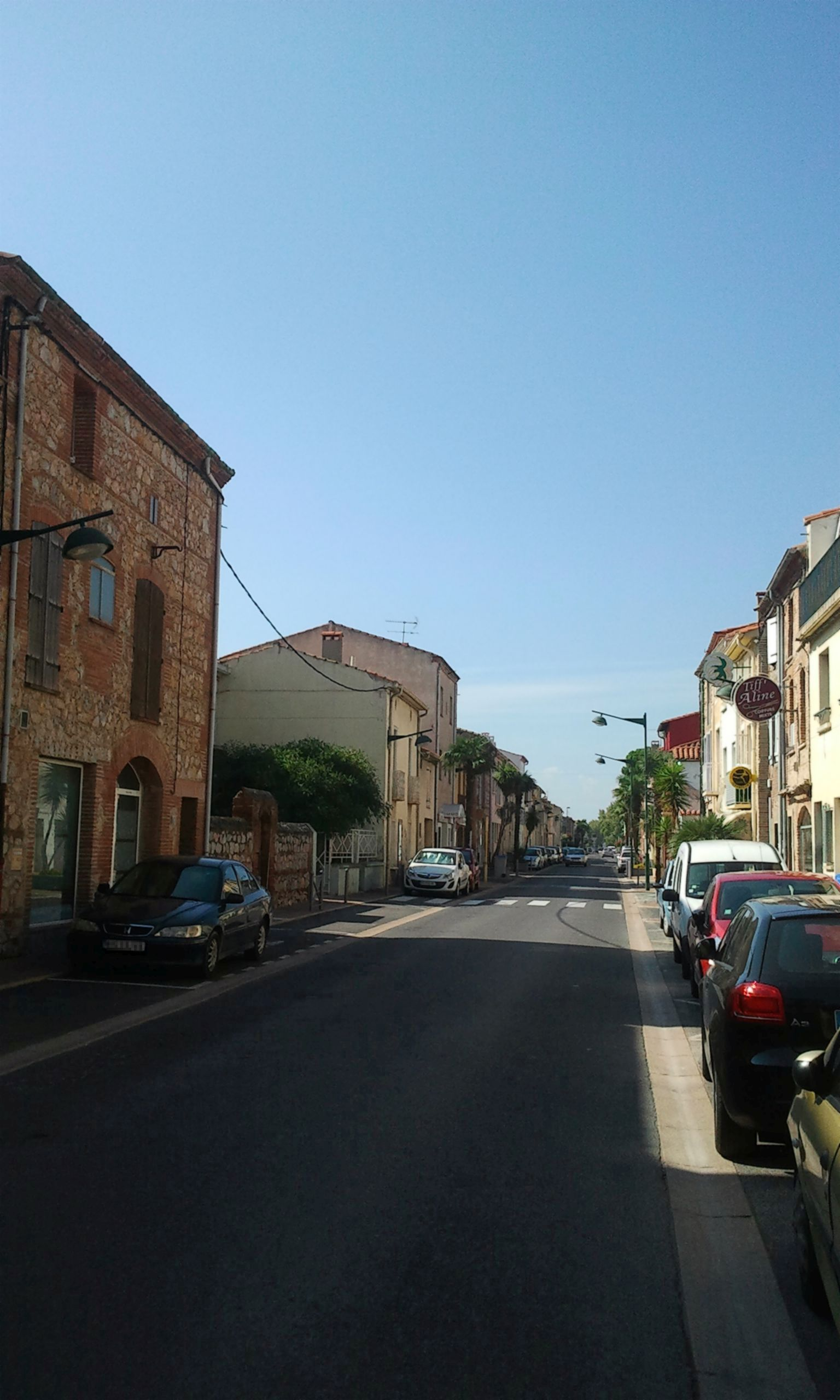 Avenue du Haut-Vernet à Bompas